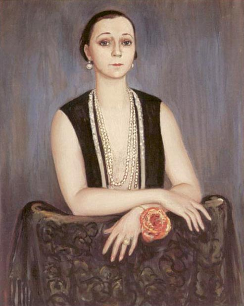 Nils Dardels oavslutade porträtt på skådespelerskan Tollie Zellman